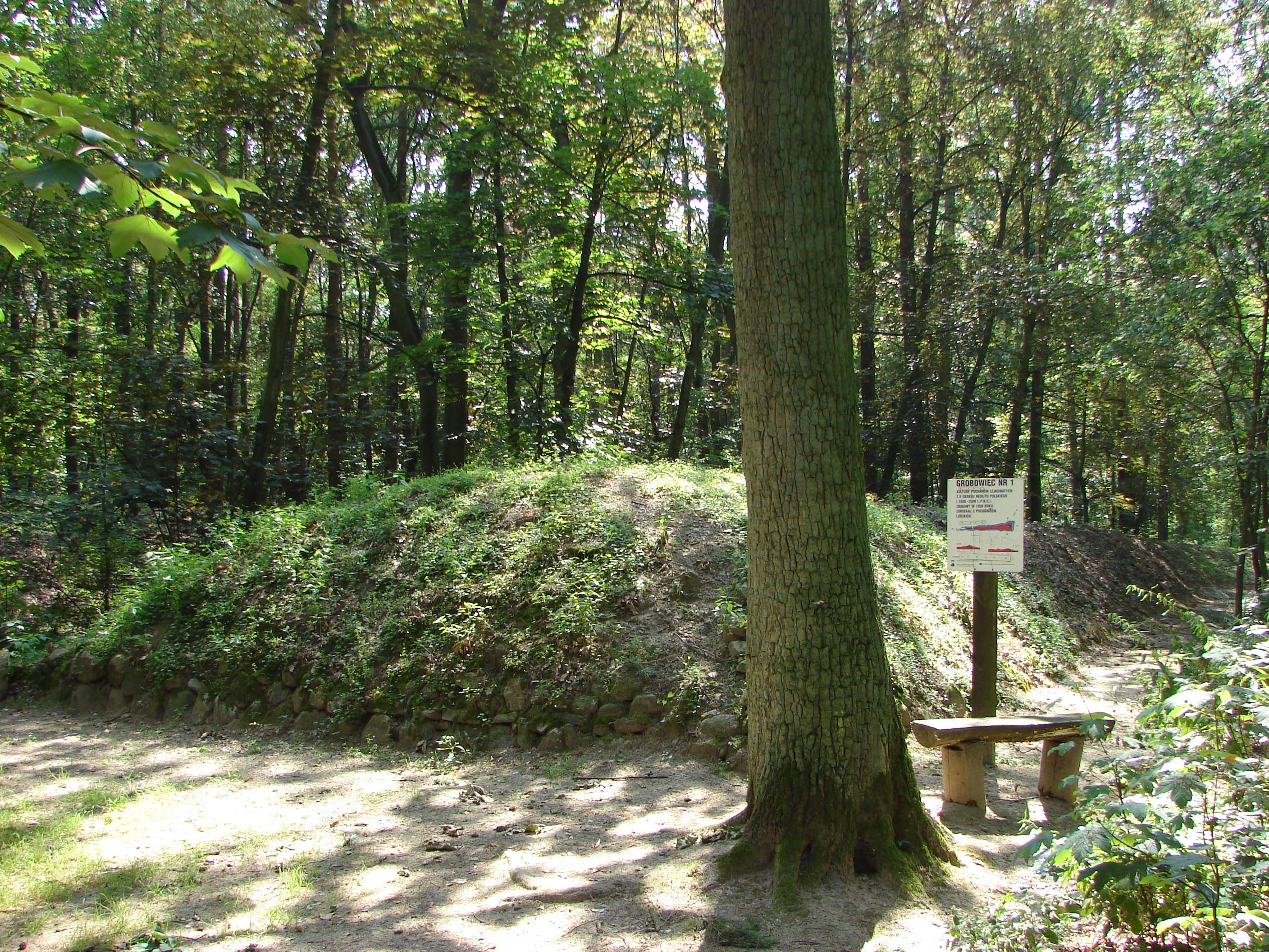 Sarnowo, Gmina Lubraniec, Grobowiec nr 1